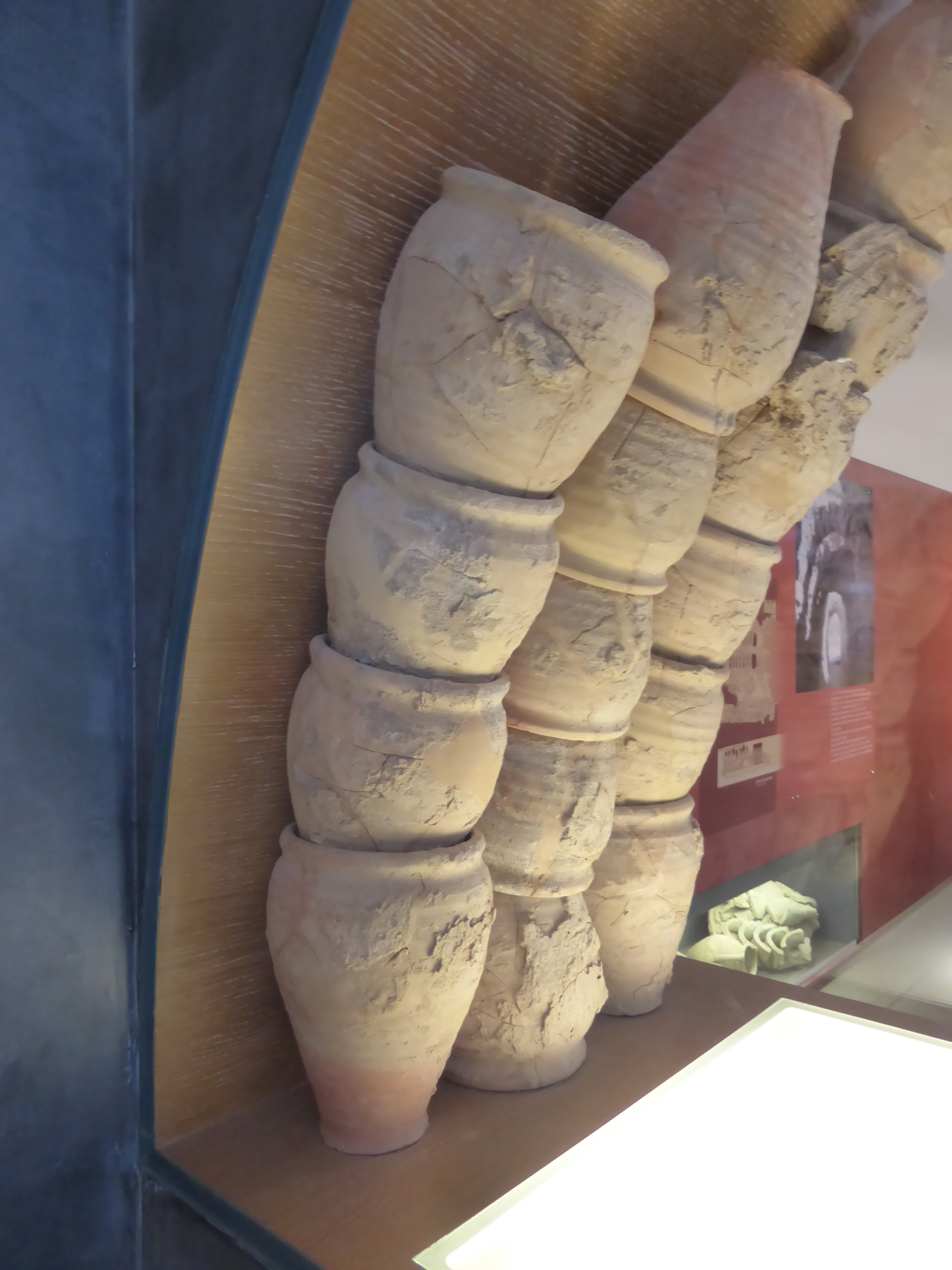 Musée Amphoralis, site de l'atelier de poterie antique de Sallèles-d'Aude, Sallèles d'Aude, Aude, France. Amphores constituant le four.